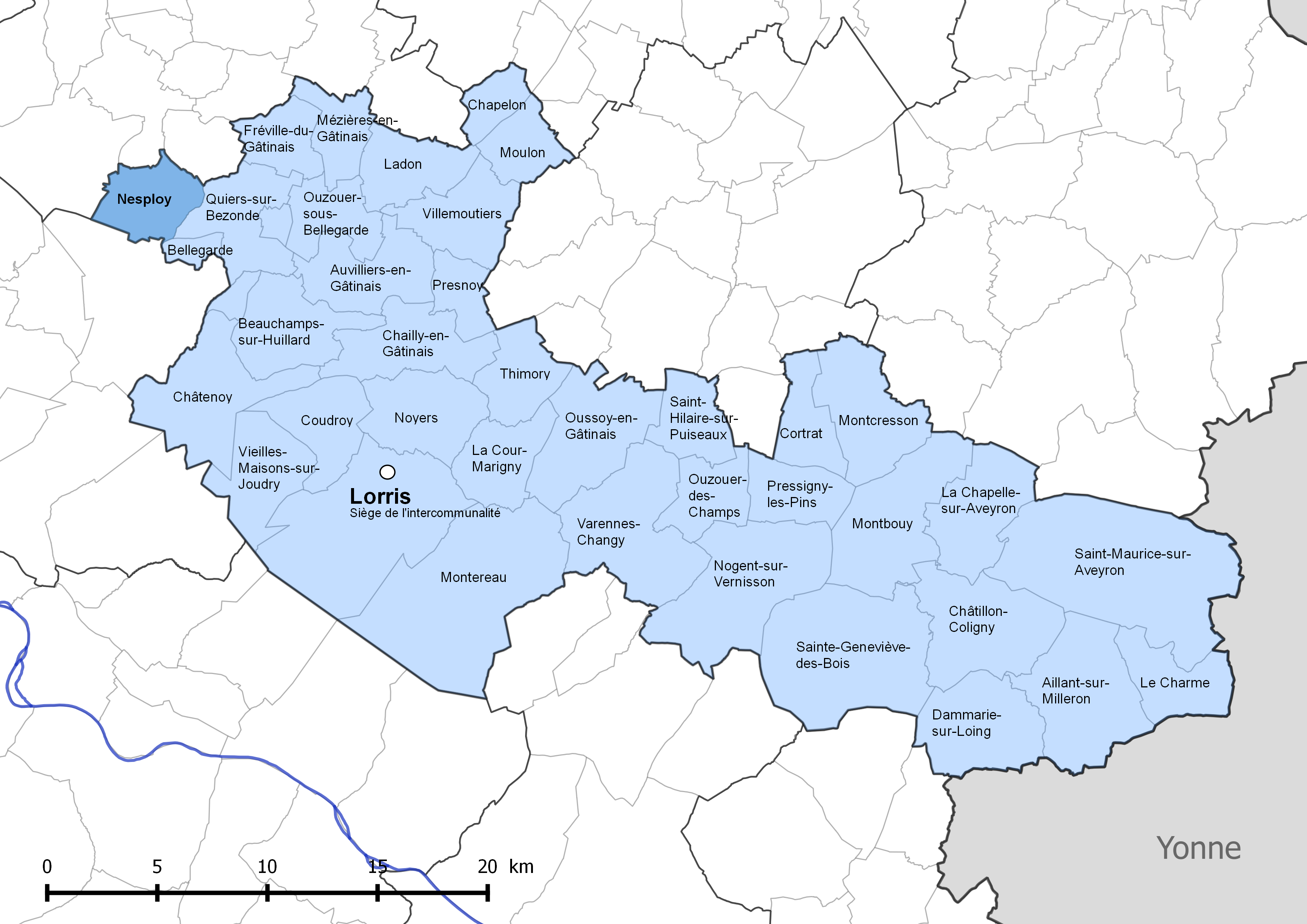 Périmètre de la communauté de communes Canaux et forêts en Gâtinais - Situation de la commune de Nesploy.